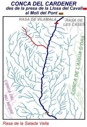 Mapa dun fragment de la Conca del Cardener (de la pres de la Llosa del Cavall al Molí del Pont) on hi apareix remarcada la Rasa de la Salada Vella.